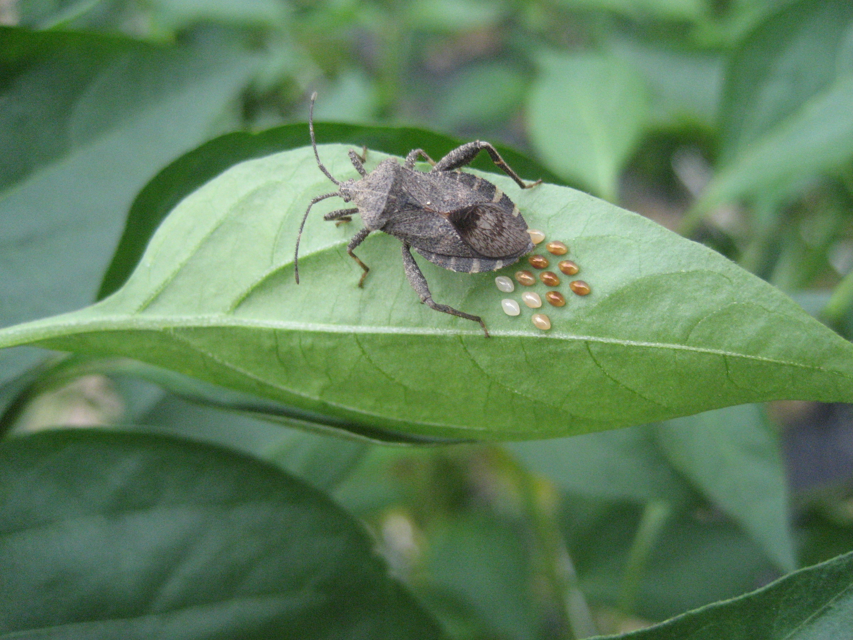 노린재의 산란